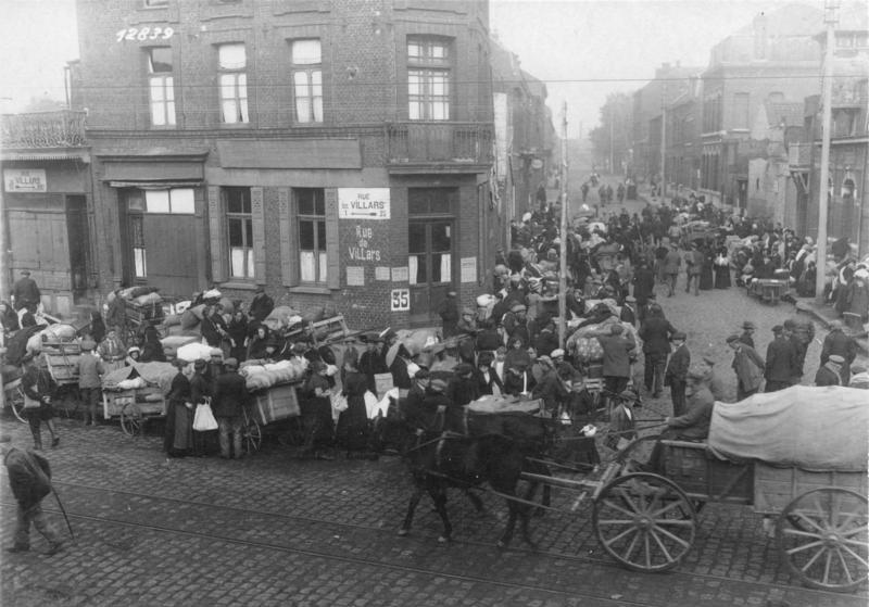 Douai am 2. Oktober nach erneuter feindlicher Beschießung. Die Zivilbevölkerung von Douai wird bei Einsetzen der Beschießung in Sicherheit gebracht. 1916 Information added by Wikimedia users.